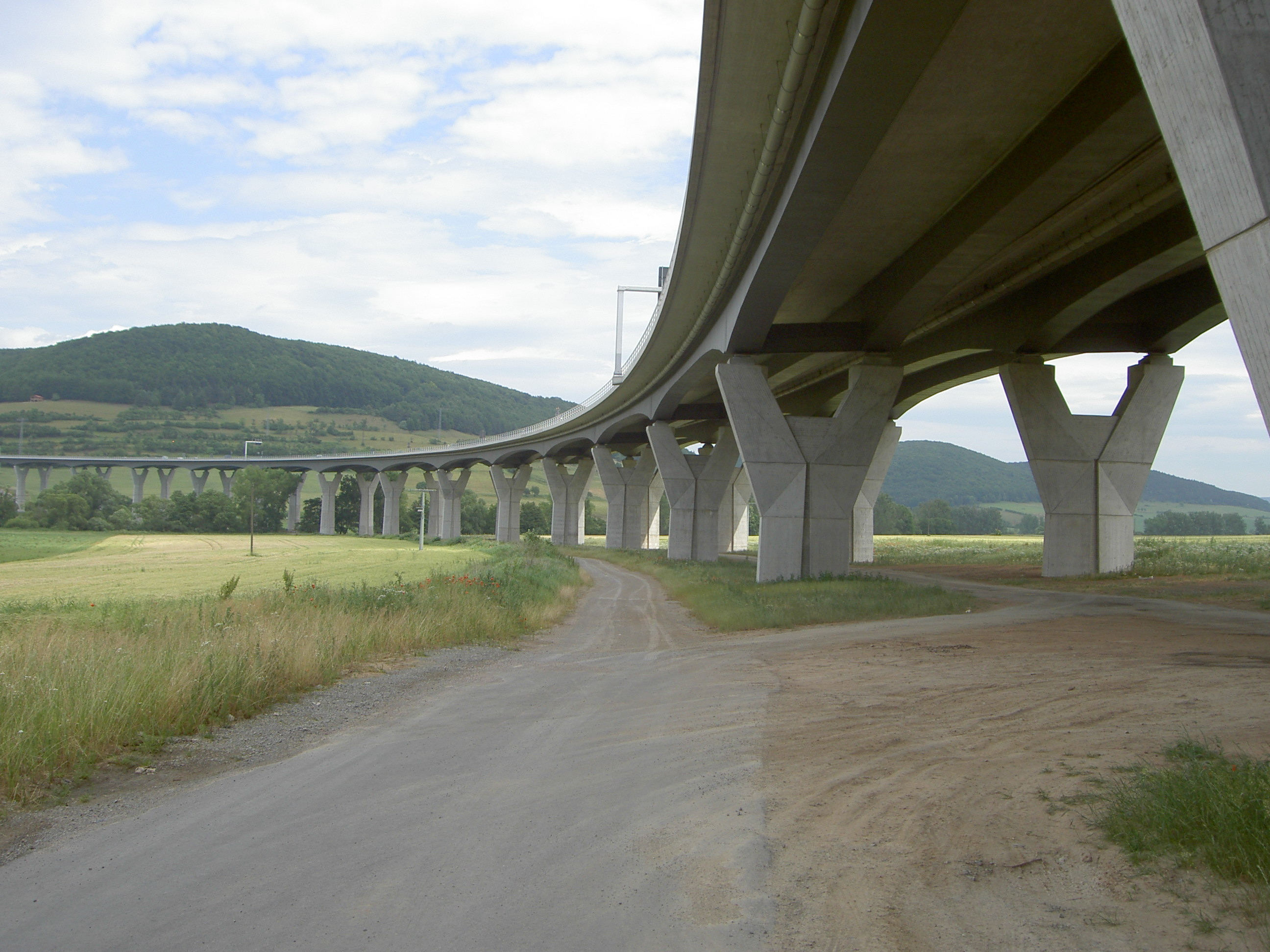 A71 Talbrücke Werra (Einhausen)